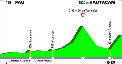 profiel van de 10e etappe van de Tour de France 2008